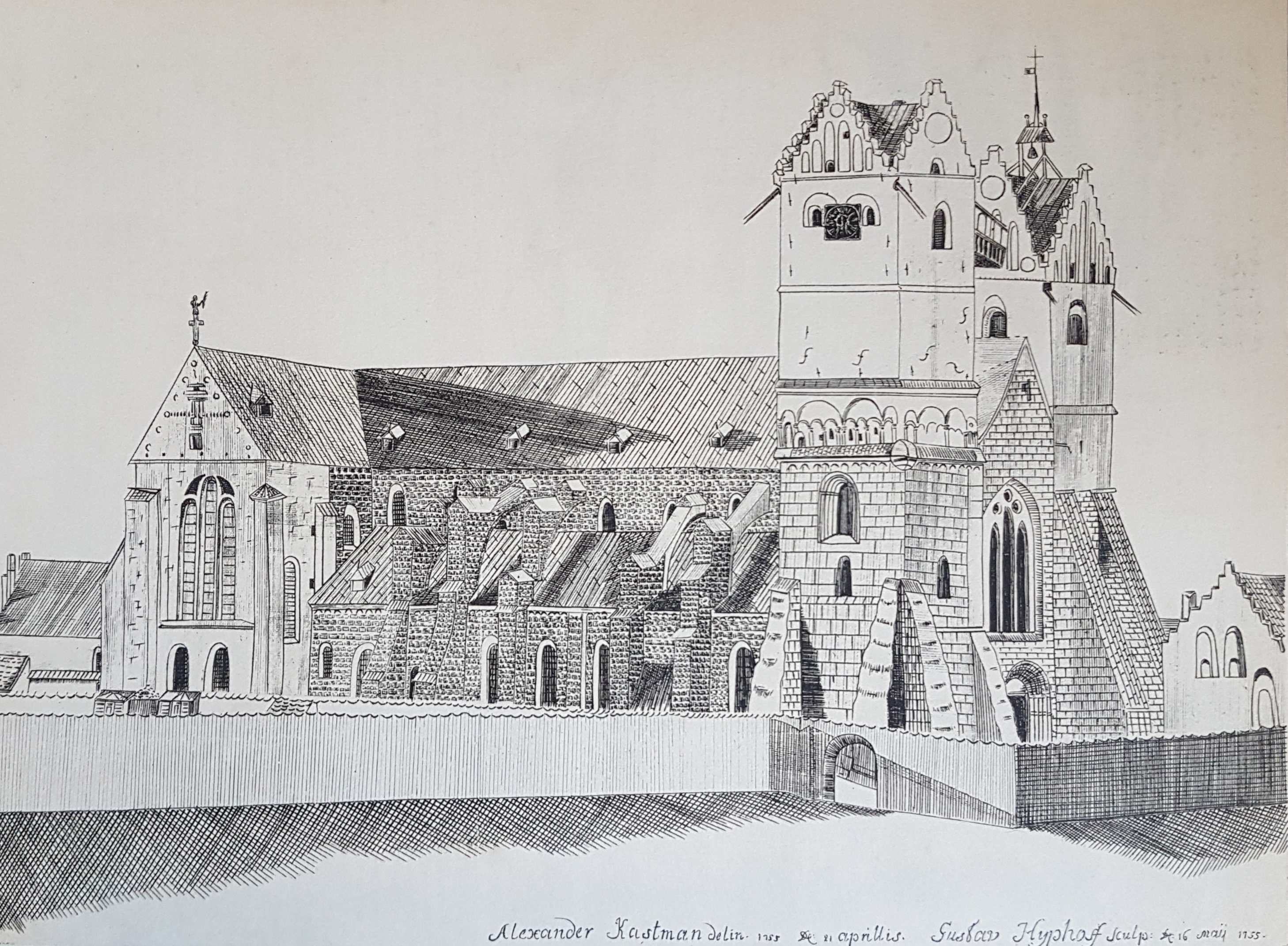 Lunds domkyrka skapad av Alexander Kastman and Gustaf Hyphoff, avfotograferad bild från Allhems Svenskt konstnärslexikon.